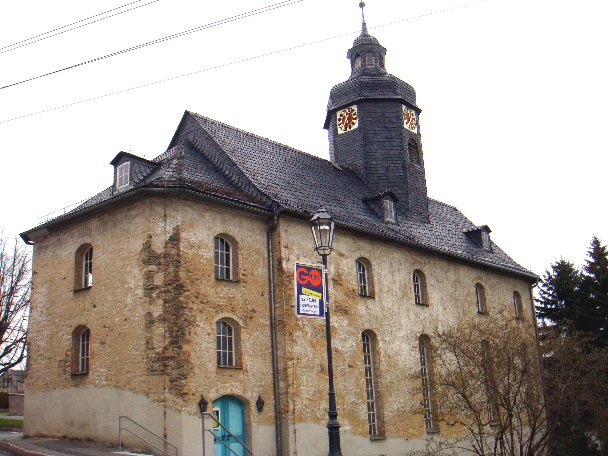 Evangelische Kirche Remptendorf